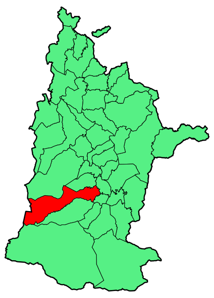 Aipaturiko udalerriaren kokapena Zuberoan